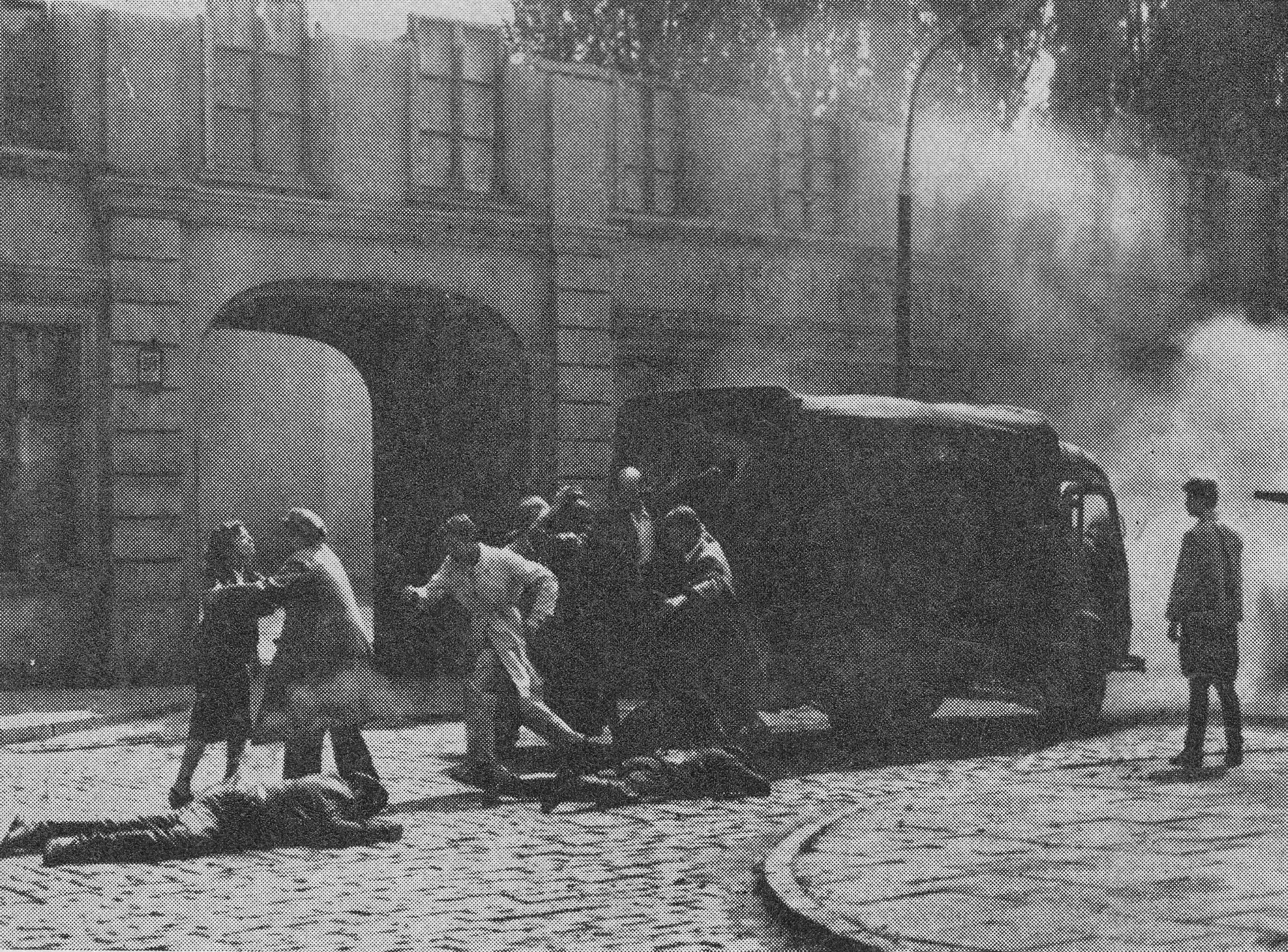 Zdjęcie z planu filmu Akcja pod Arsenałem w reżyserii Jana Łomnickiego